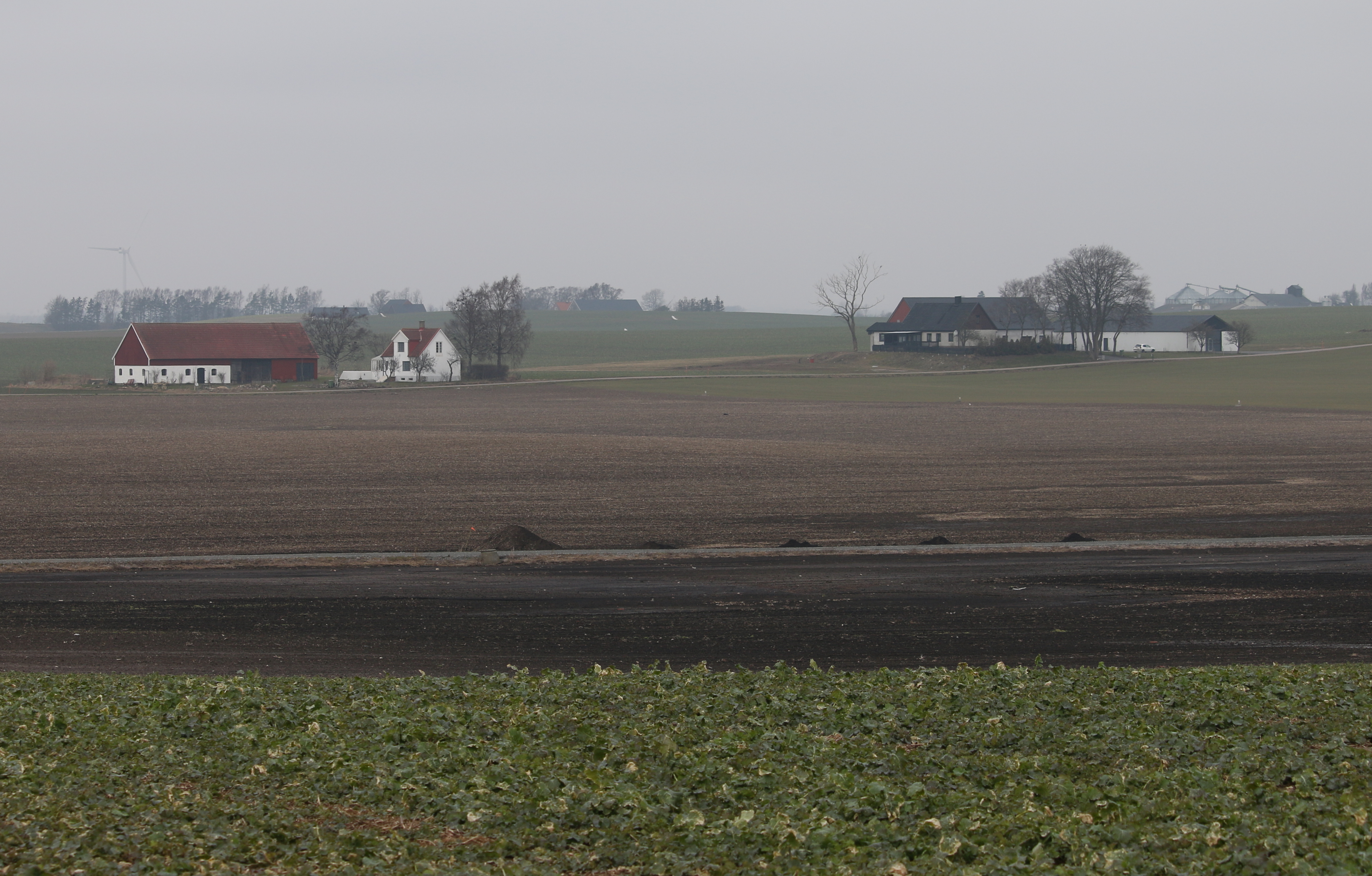 Glimminge, Österlen